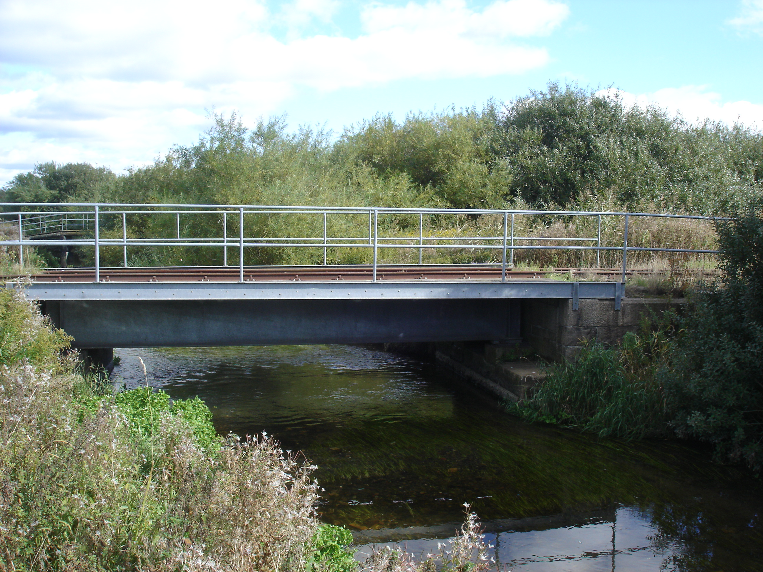 Aalborg-Hadsund-banens bro over Østerå